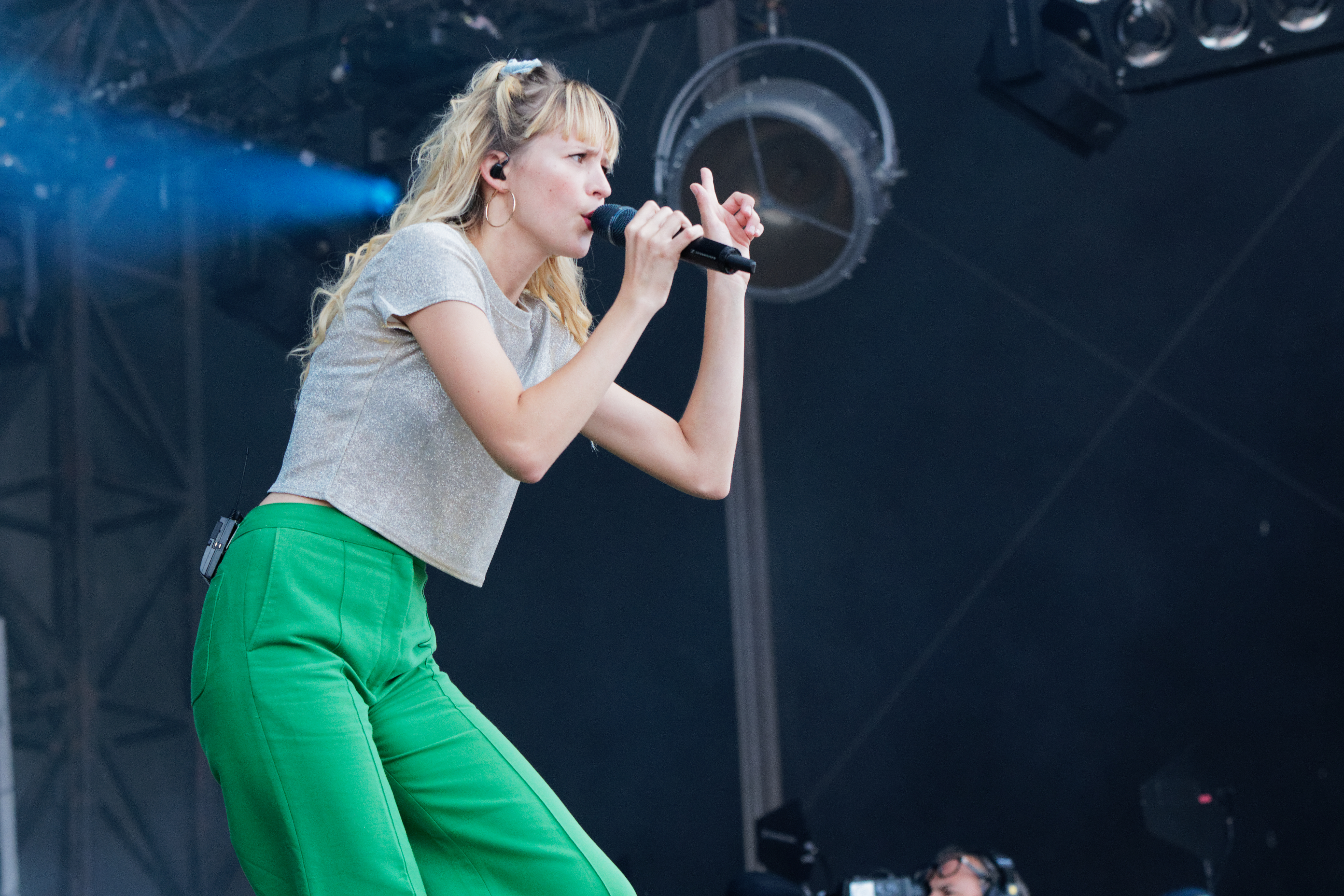 Angèle en concert lors du festival des vieilles charrues 2018.